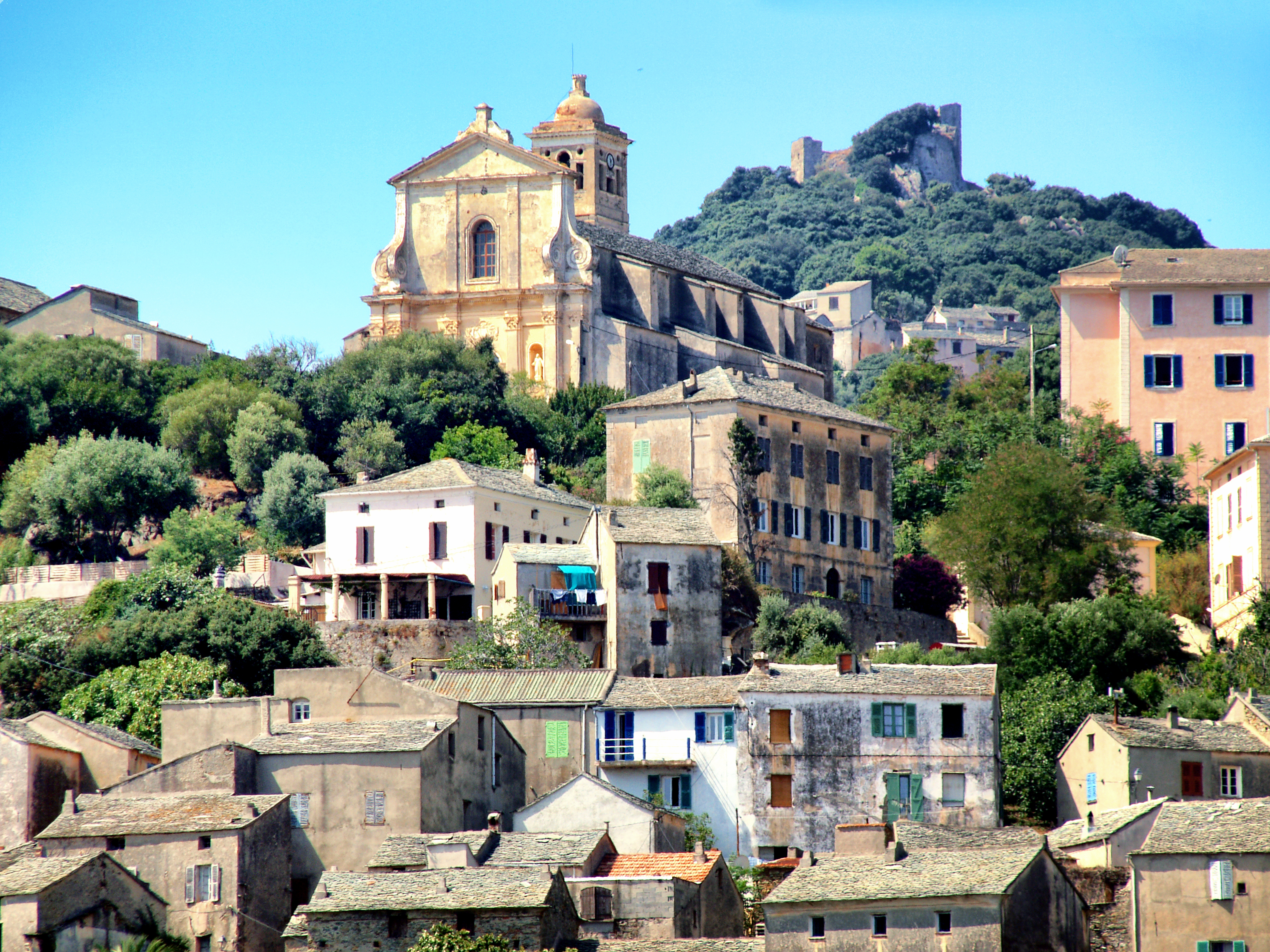 Rogliano, Cap (Corse) - L'église Sant'Agnello à Parocchia. En arrière-plan, les ruines du Castello San Colombano